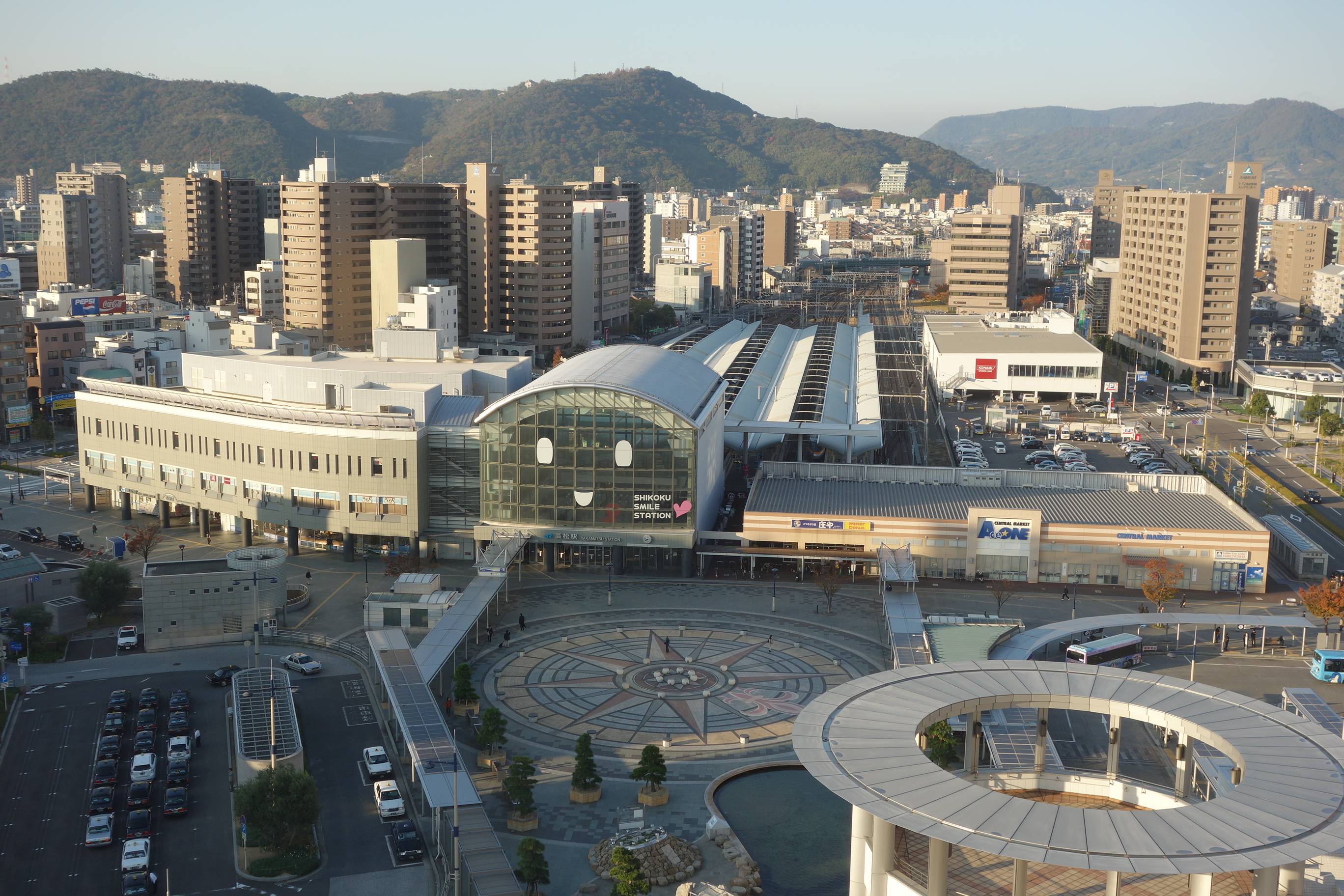 Takamatsu station